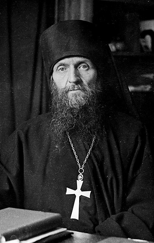 Архим. Киприан (Керн). Фотография. 30-е гг. ХХ в.